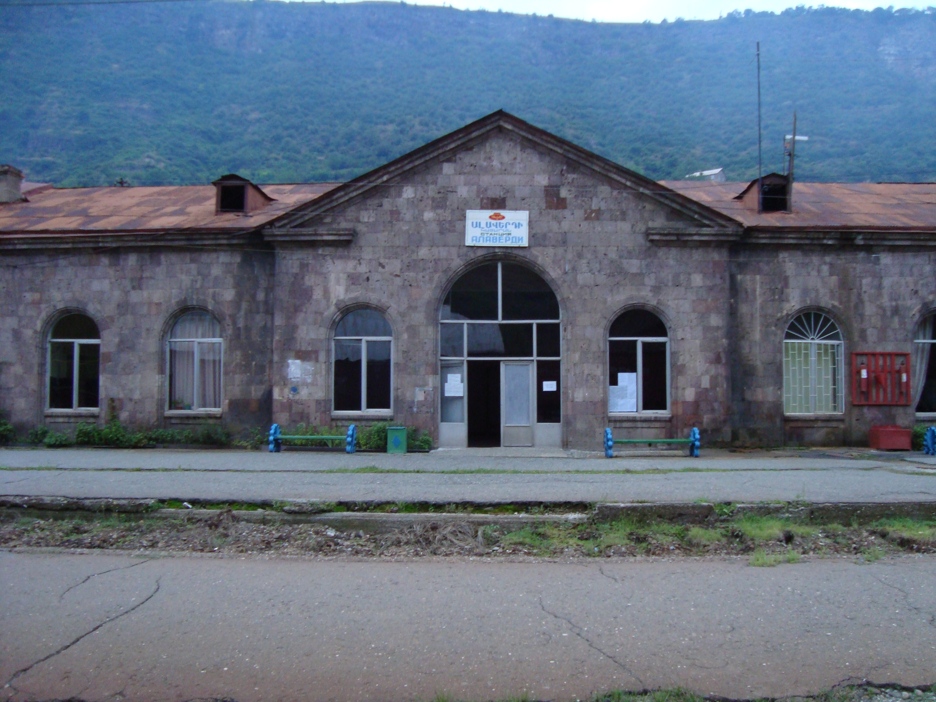 Railroad station in Alaverdi, marz (province) Lori, Repuplic of Armenia.